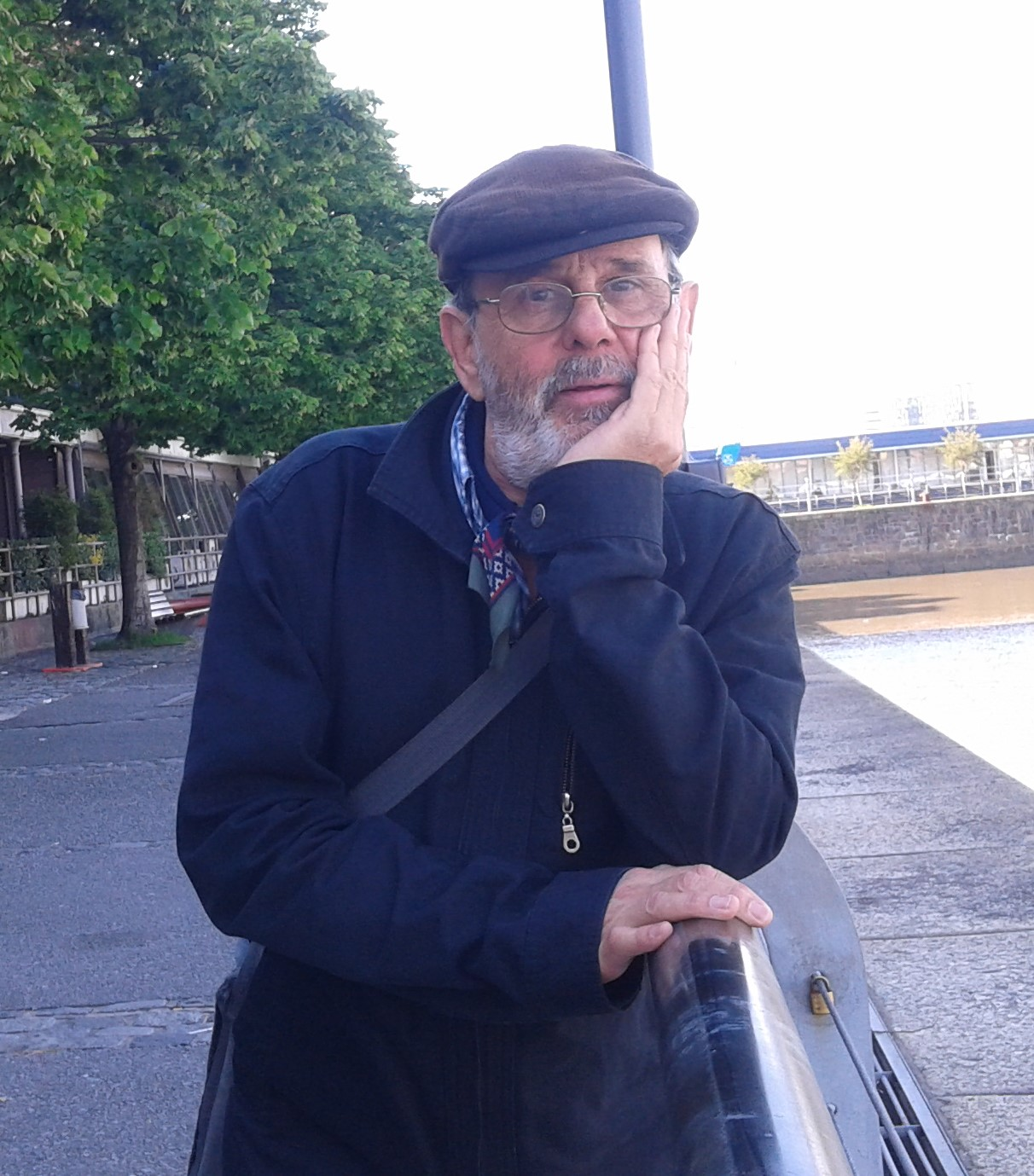 Diego Marcelo Petersen